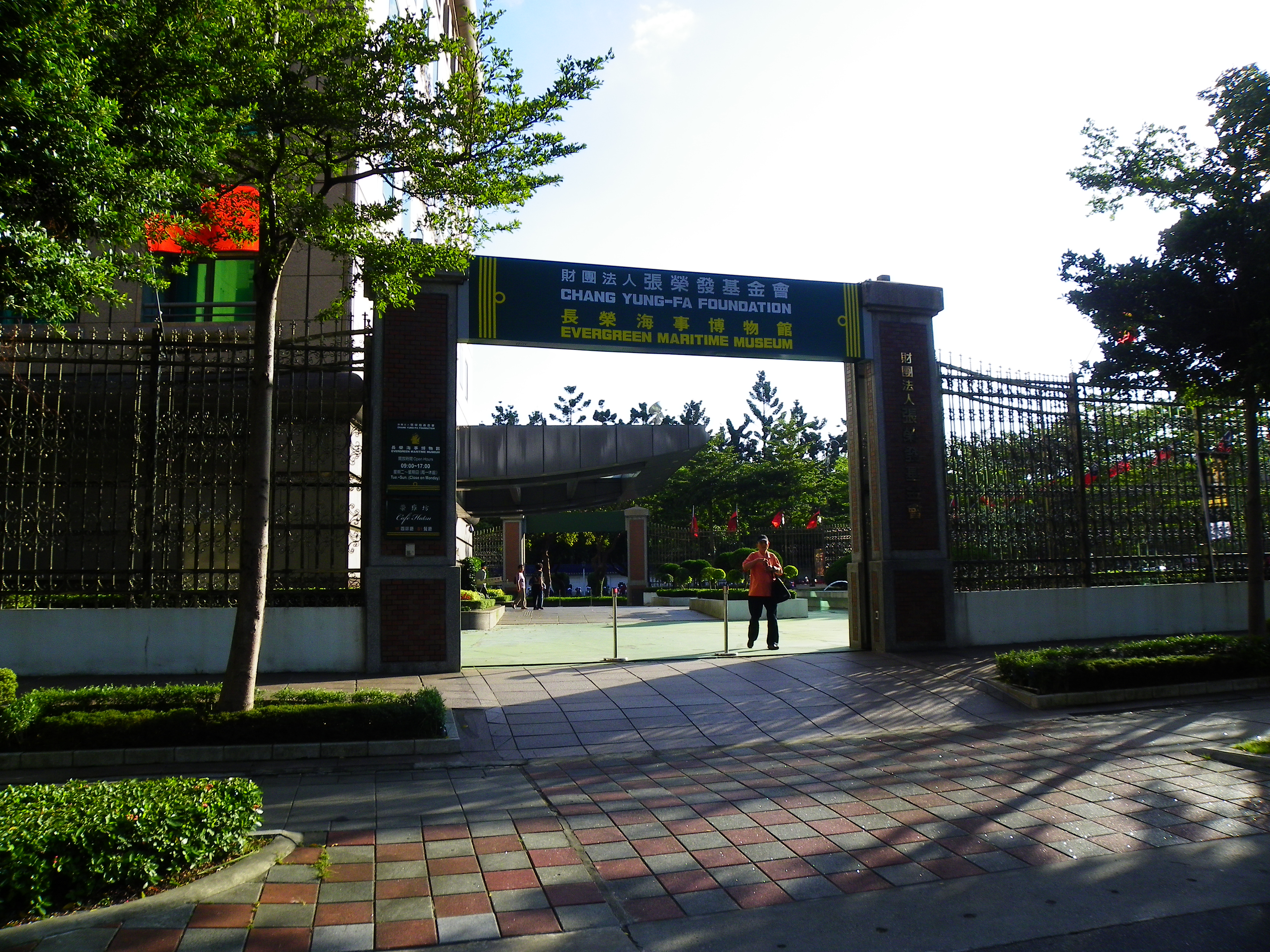 中文（台灣）: 長榮海事博物館正門北側（仁愛路一段）出口。